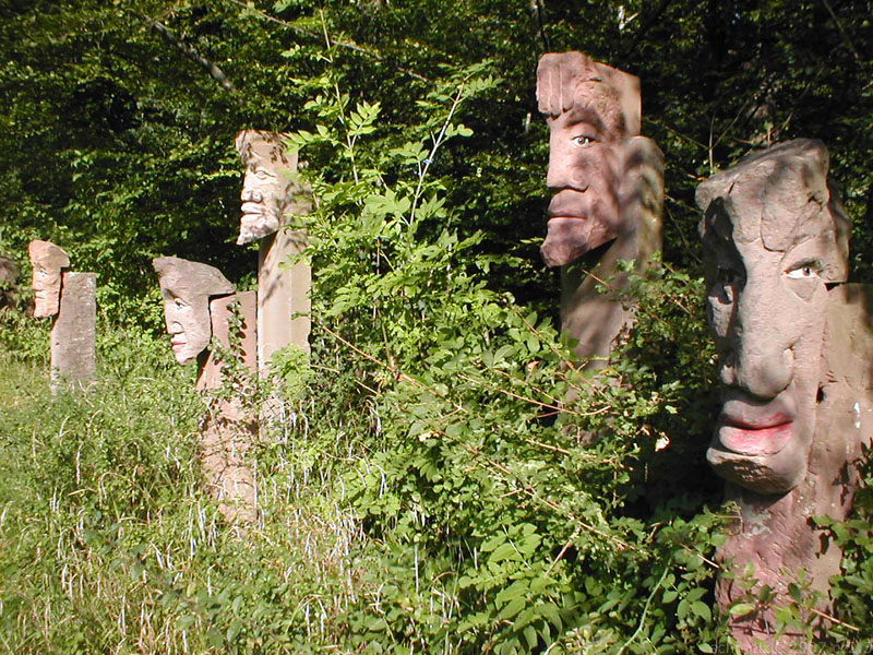 Exponate des Skulpturenparks in Seckach